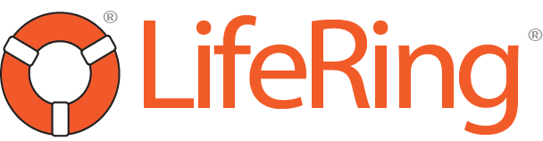 LifeRing complet